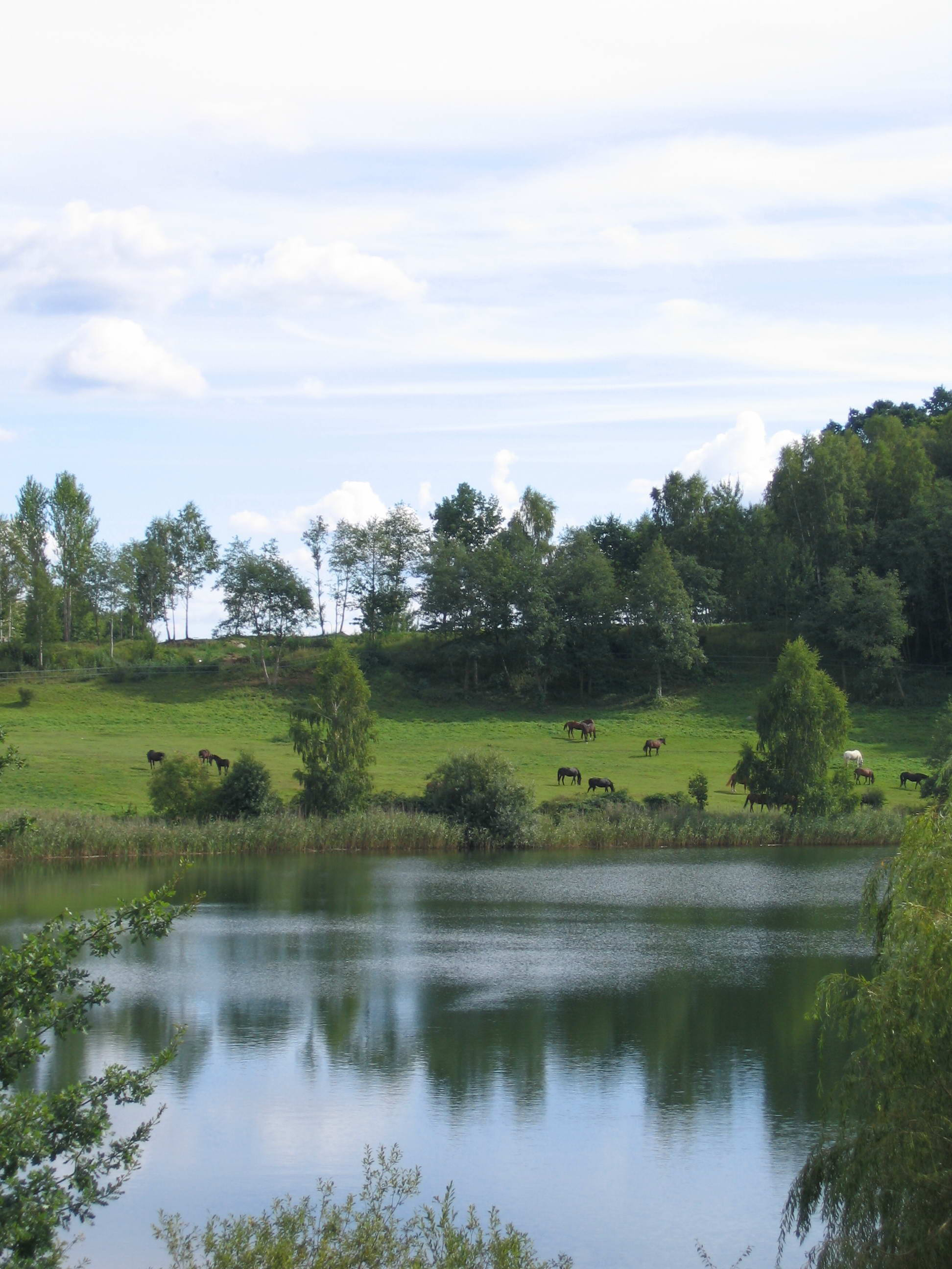 konie nad Jeziorem Stary Dwór